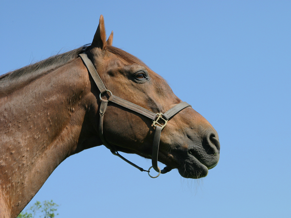 Photographie couleur d'Ourasi (Profil droit)